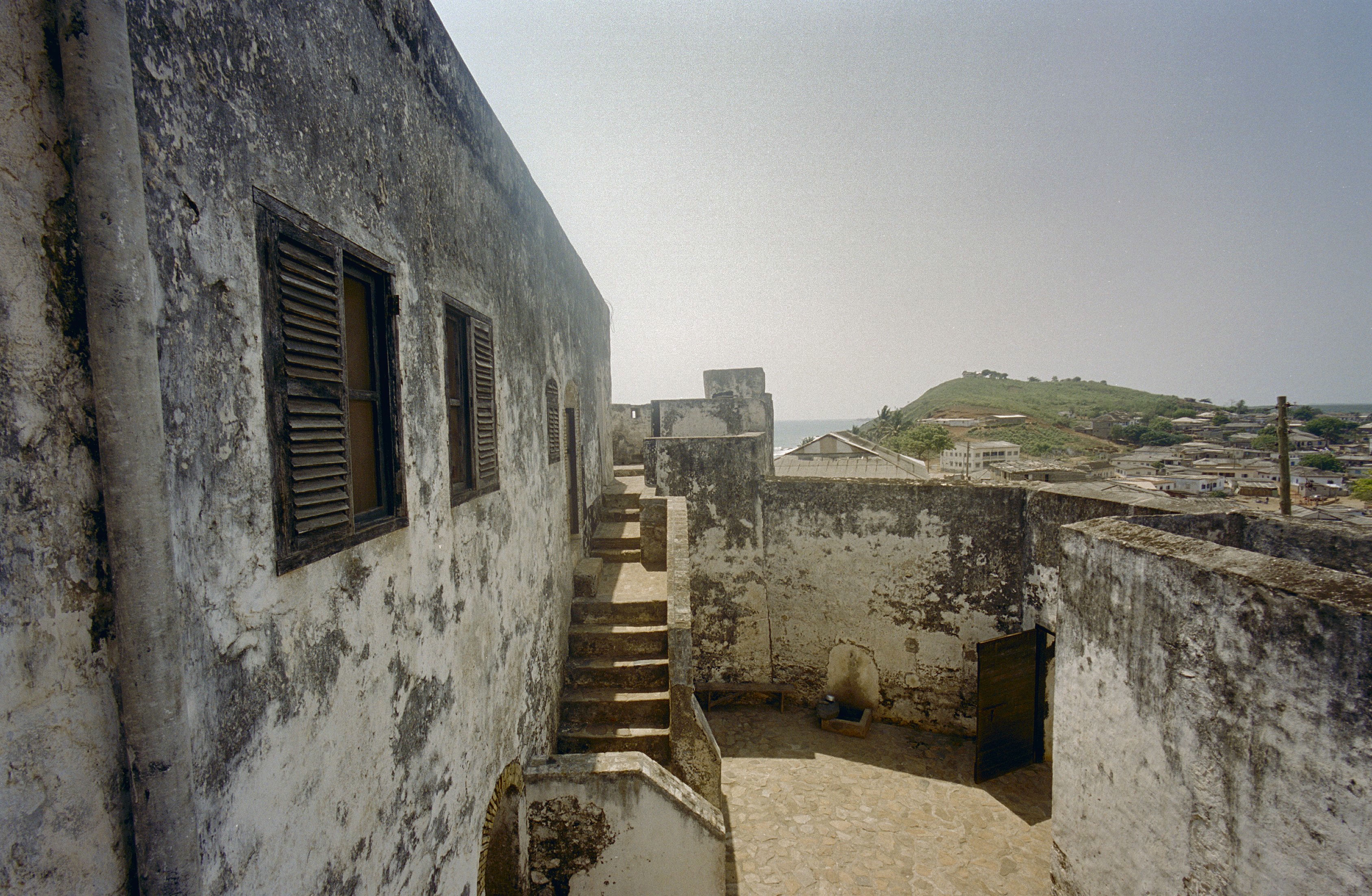 Fort Patience: Overzicht voorplein vanaf de buitenmuur (opmerking: Ghana reis Loek Tangel)